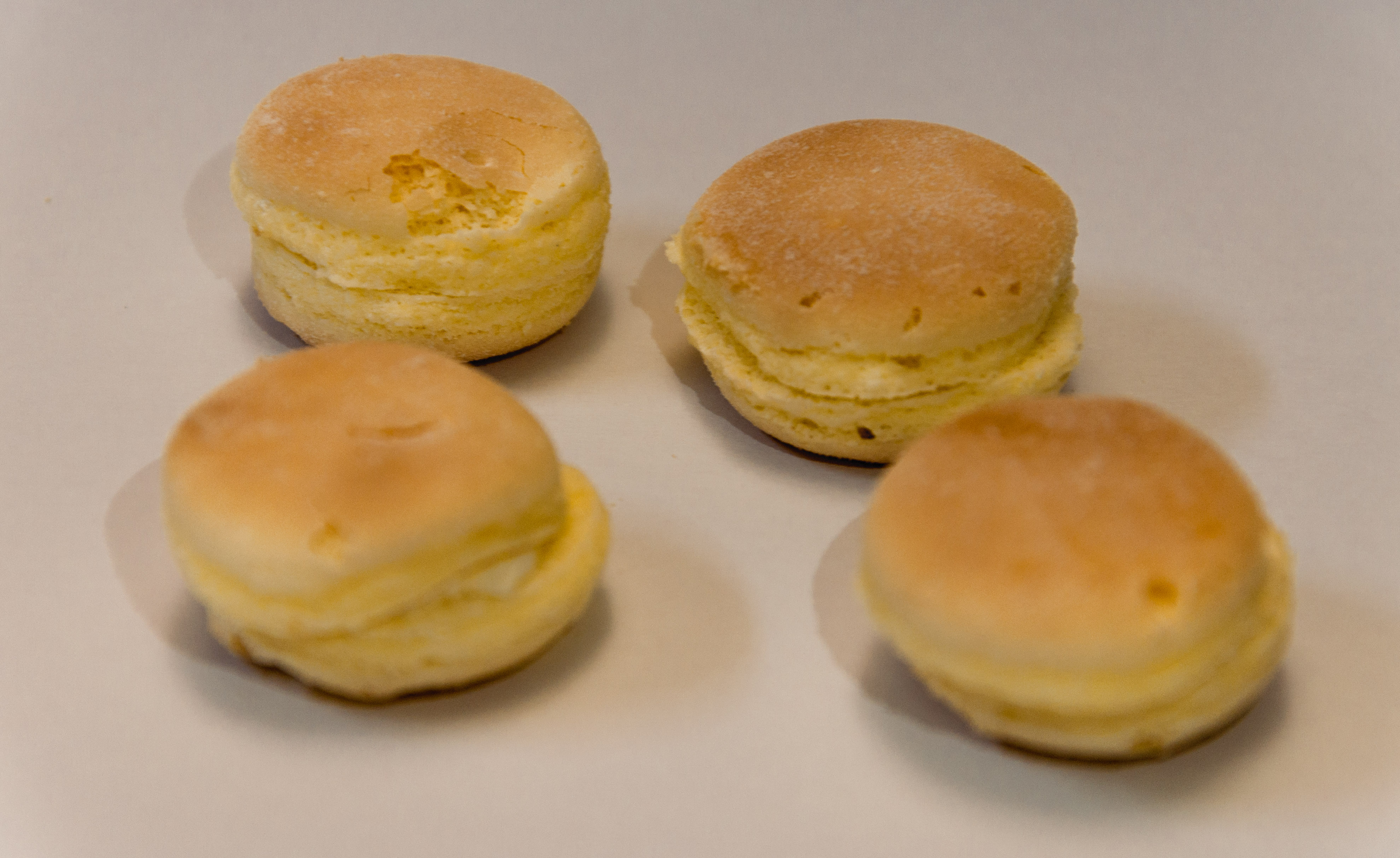 牛粒、小西點、台式馬卡龍